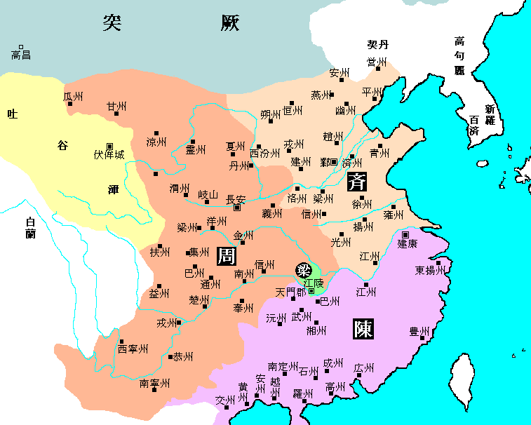 北周･北斉･陳･後梁 後梁の中宗宣帝が即位した554年～北周の北斉征服（577年）までをおおよそ反映した概念地図。 投稿者が歴史地図をもとに作成しました。